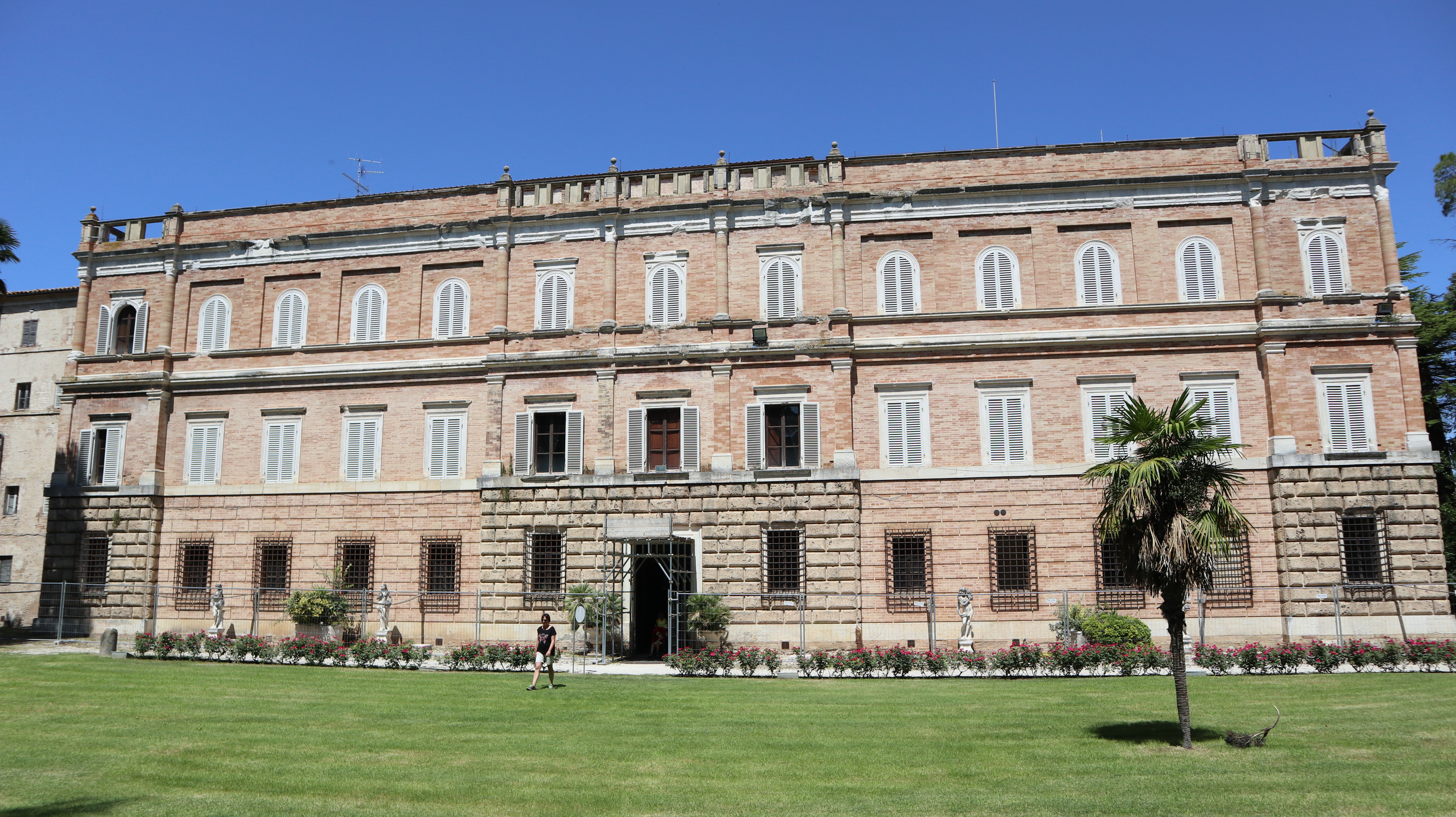 Abbadia di fiastra